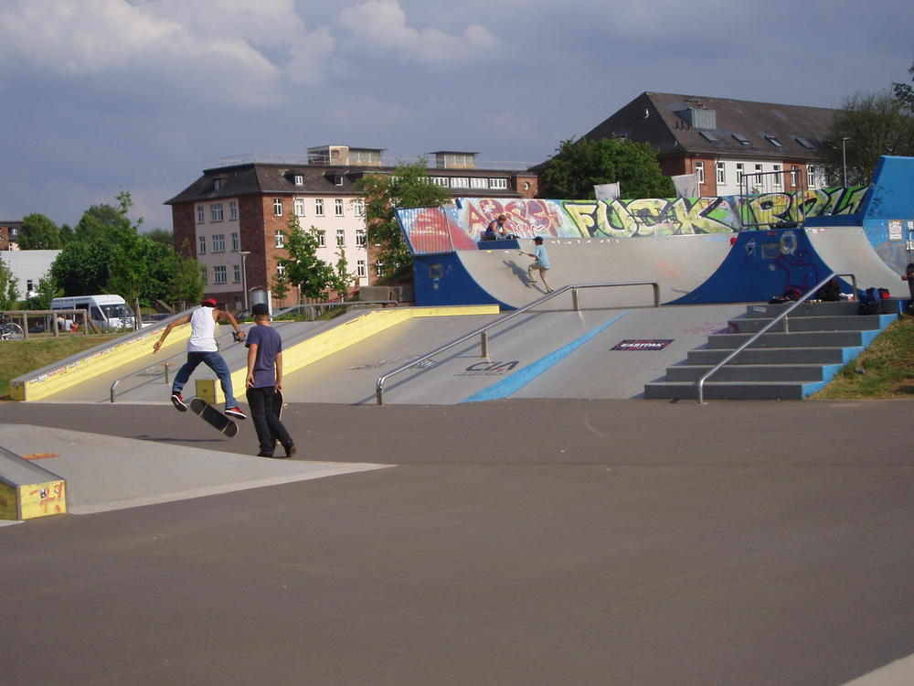 Skaterbahn im Wendelinuspark